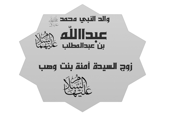 تخطيط لاسم عبدالله بن عبد المطلب